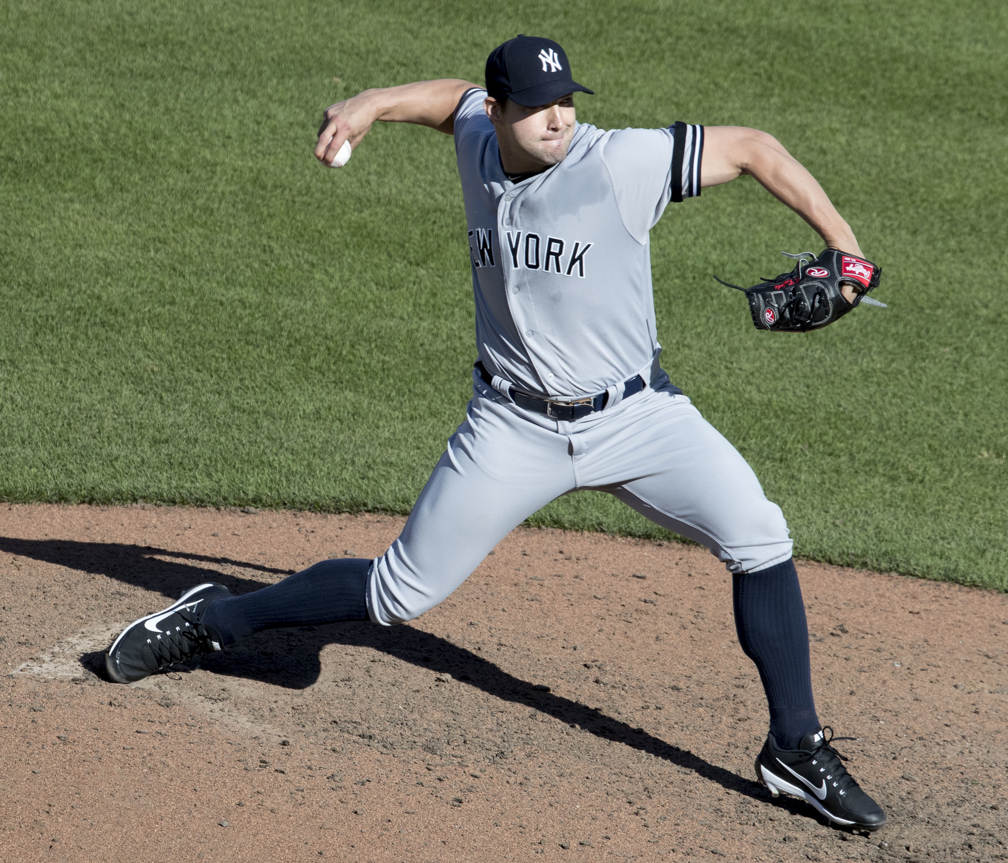 Yankees at Orioles 9/7/17